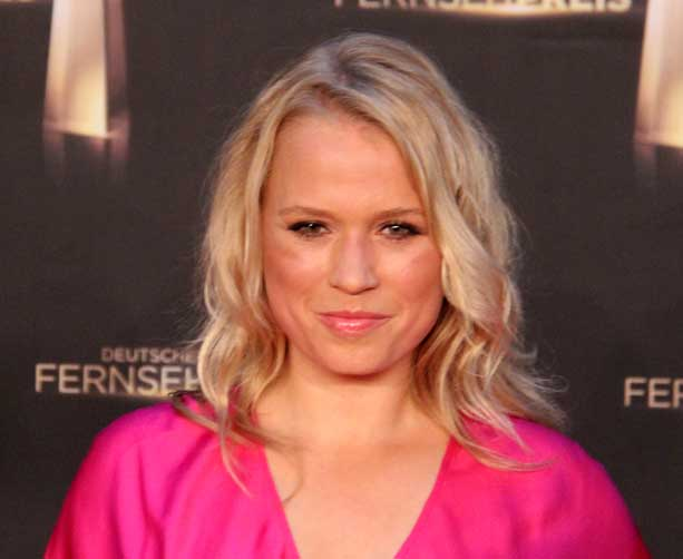 Nova Meierhenrich beim Deutschen Fernsehpreis 2012